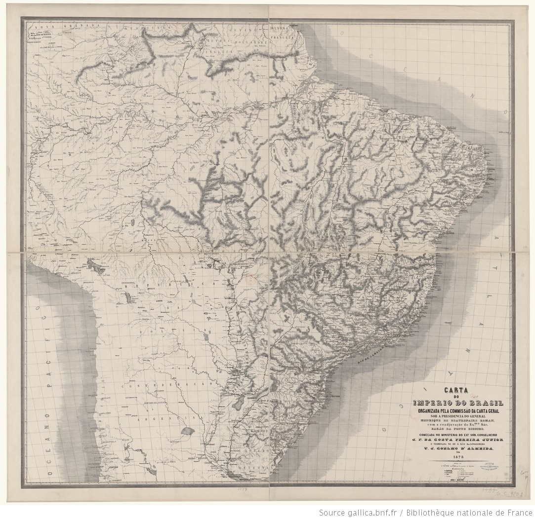 Organizada pela Comissão da Carta Geral do Império (1862-1878), este mapa foi originalmente composto de quatro folhas e organizado juntamente nesta imagem.